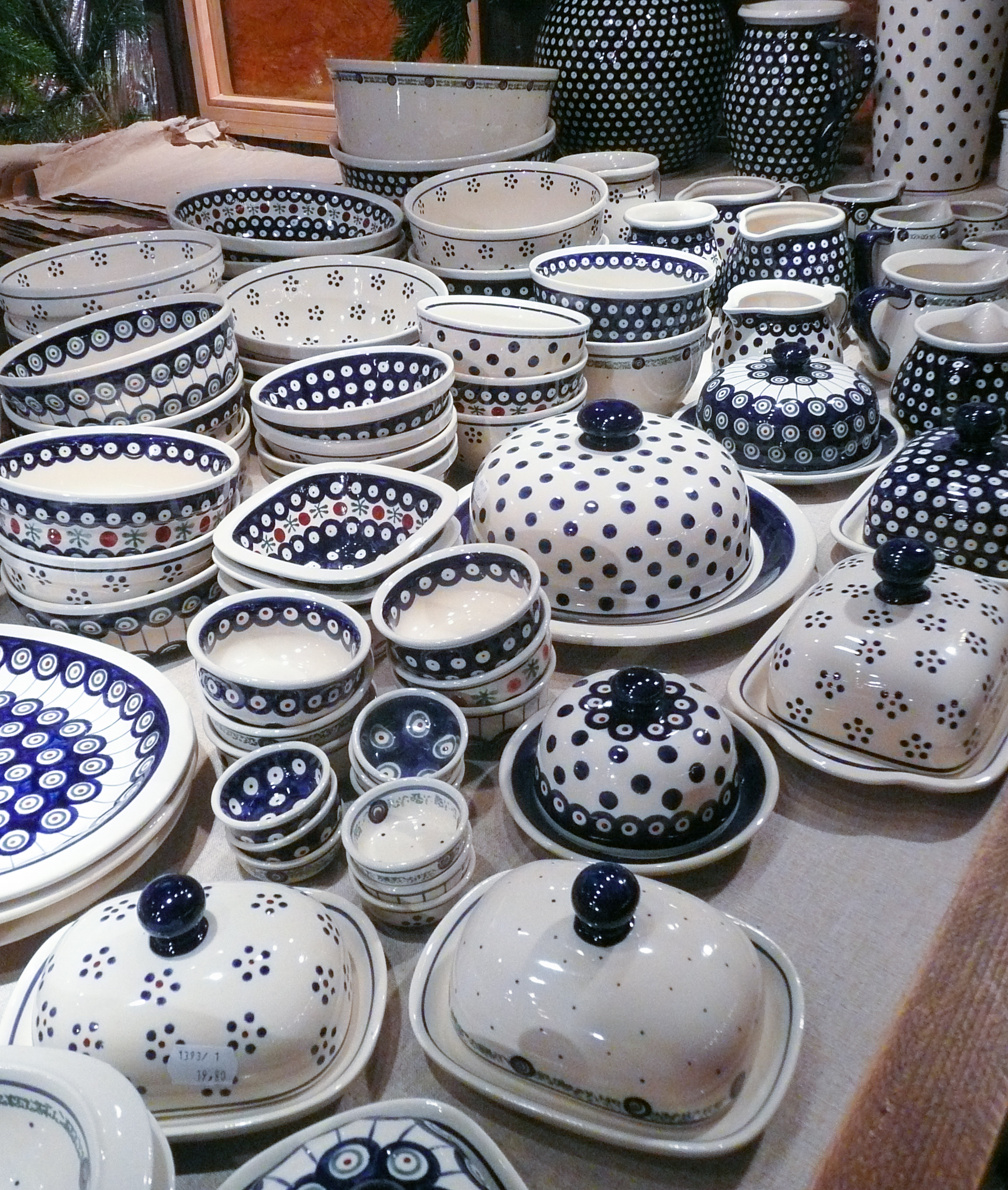 handgefertigte Keramik aus Bolesławiec (dt. Bunzlau) (Woiwodschaft Niederschlesien, Polen), fotografiert auf einem Weihnachtsmarkt in Baden-Württemberg (Deutschland)